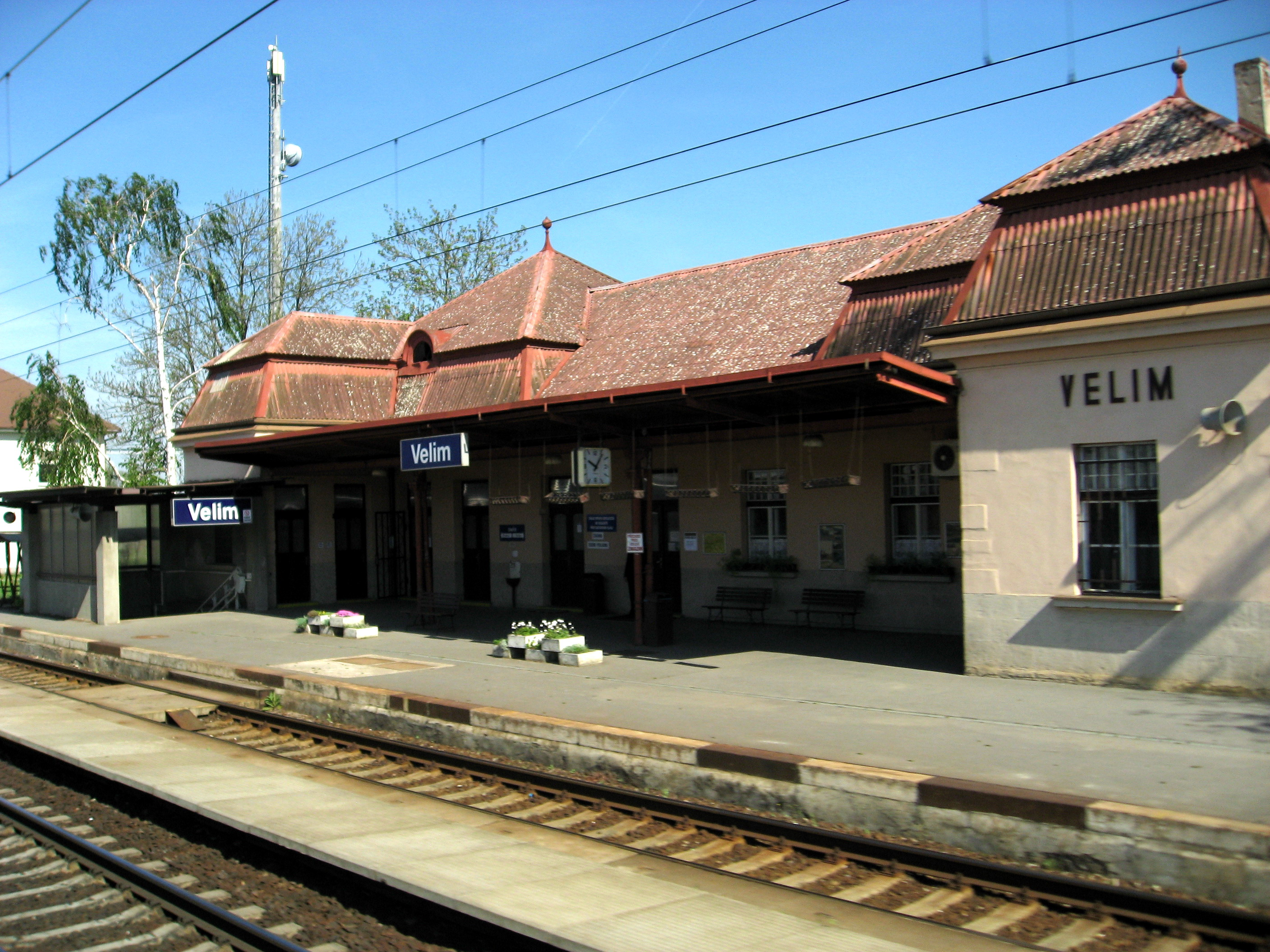 Velim, železniční stanice